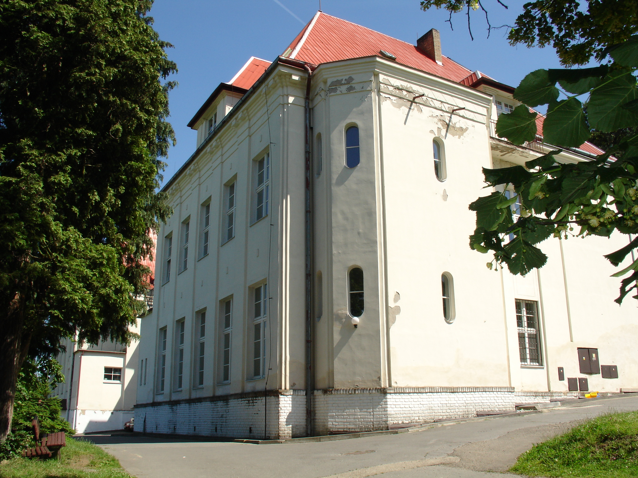 Pyšely, dětský domov, Senohrabská 112.